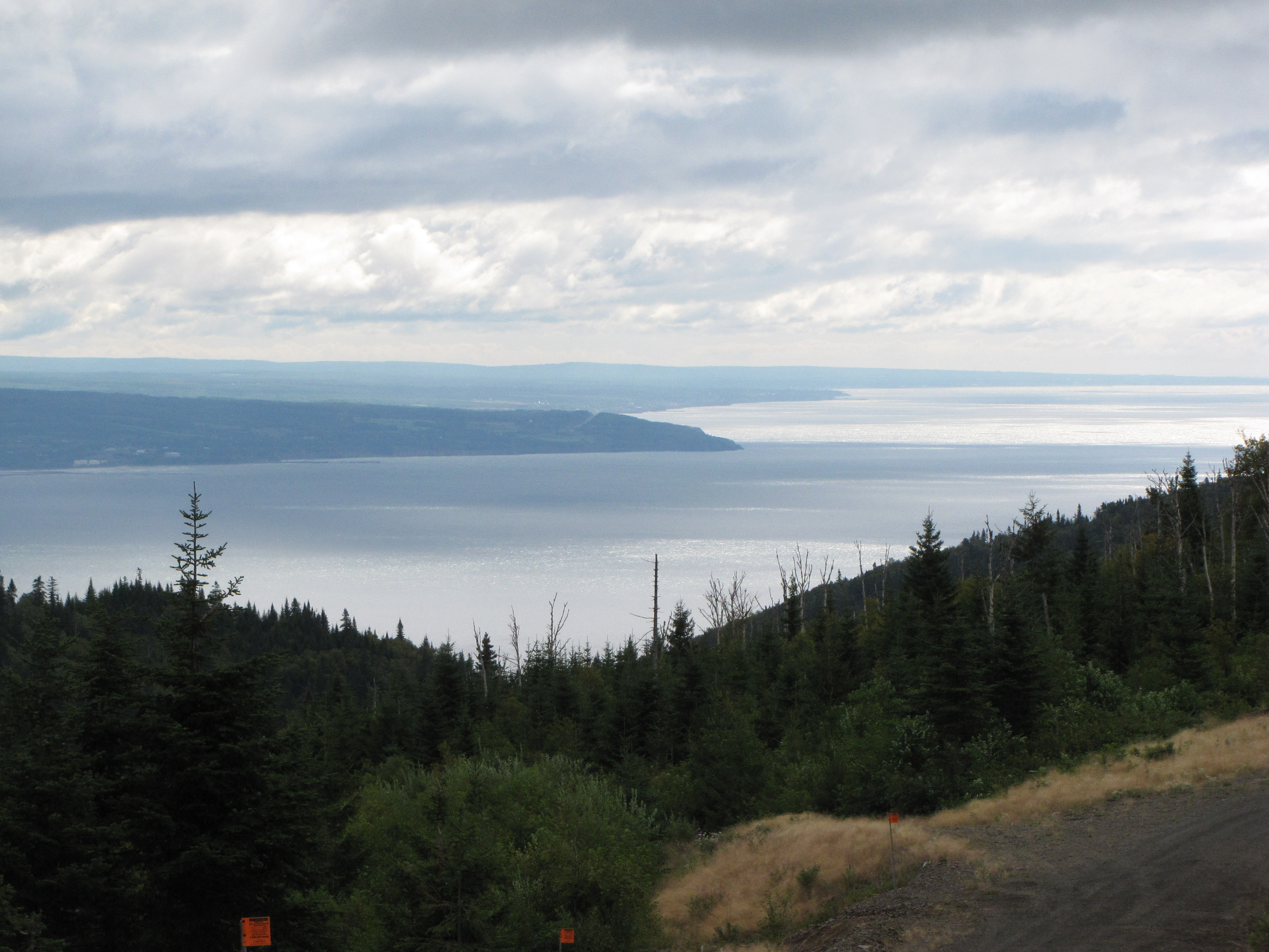 LA BAIE DES CHALEURS & LE NOUVEAU-BRUNSWICK ---Parc éolien de Carleton-sur-mer de la cie Cartier Énergie